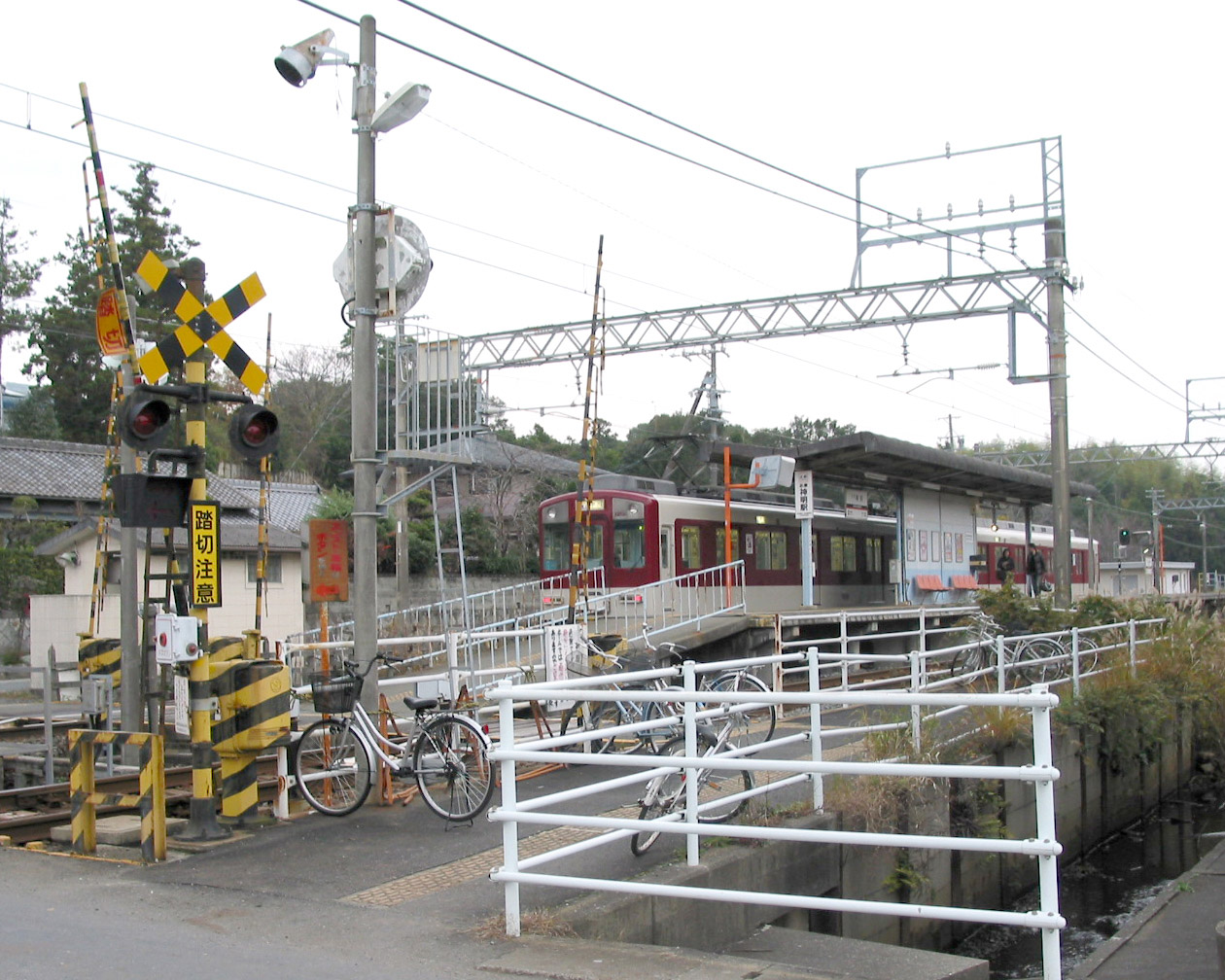 近鉄志摩線ja:志摩神明駅 2006/12/16 投稿者が撮影